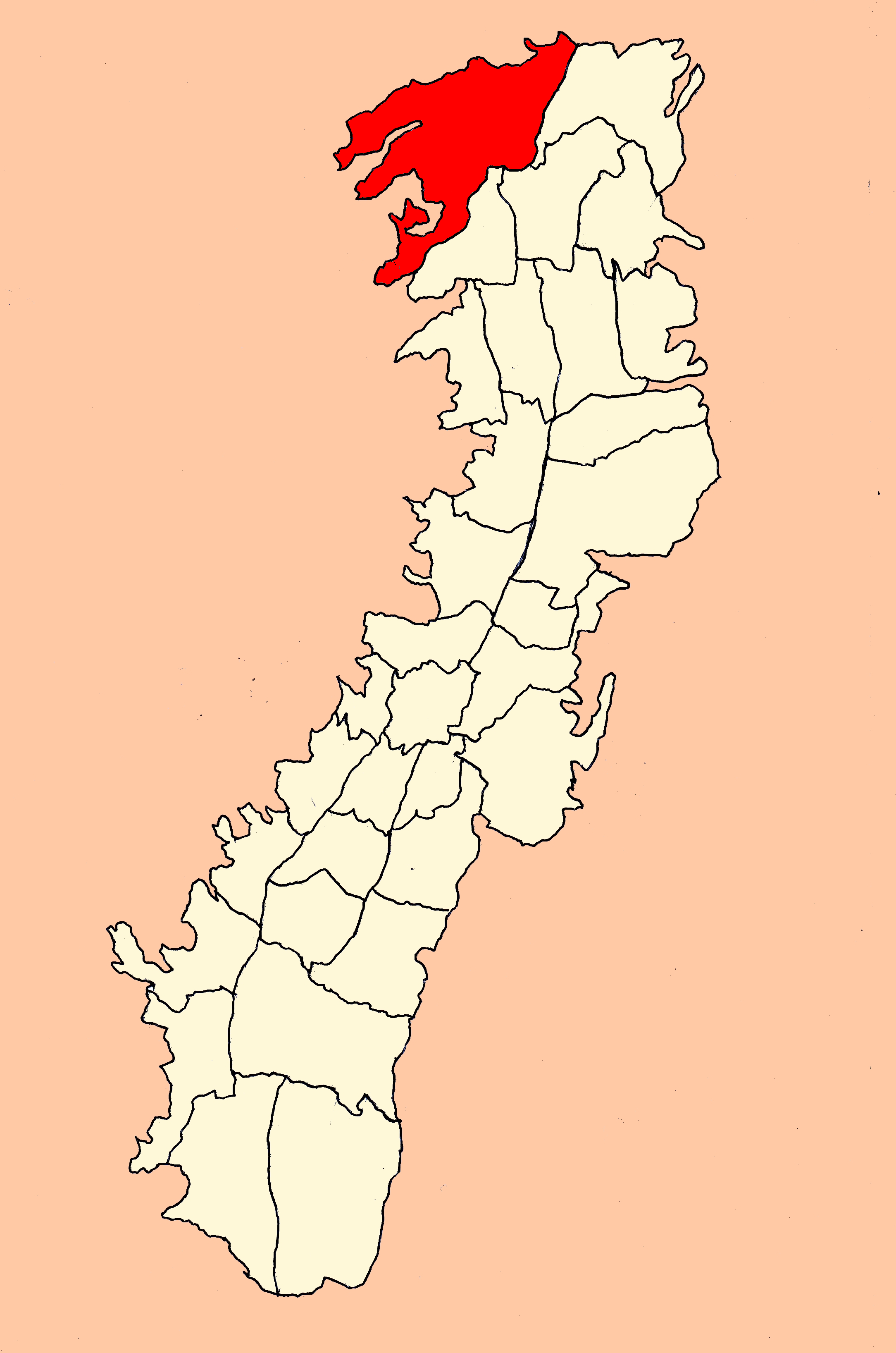 Parroquia El Condado (Quito, Ecuador)